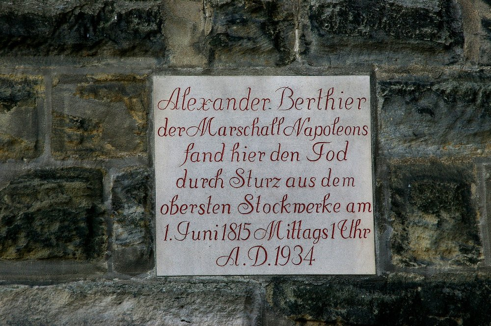 Bamberg Residenz - Gedanktafel Berthier